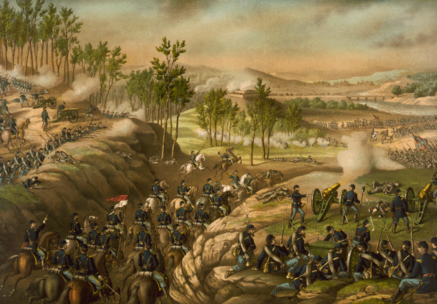 Battle of Resaca--May 13 to 16, 1864 ... CREATED/PUBLISHED: c1889. by Kurz & Allison. Source: Library of Congress.